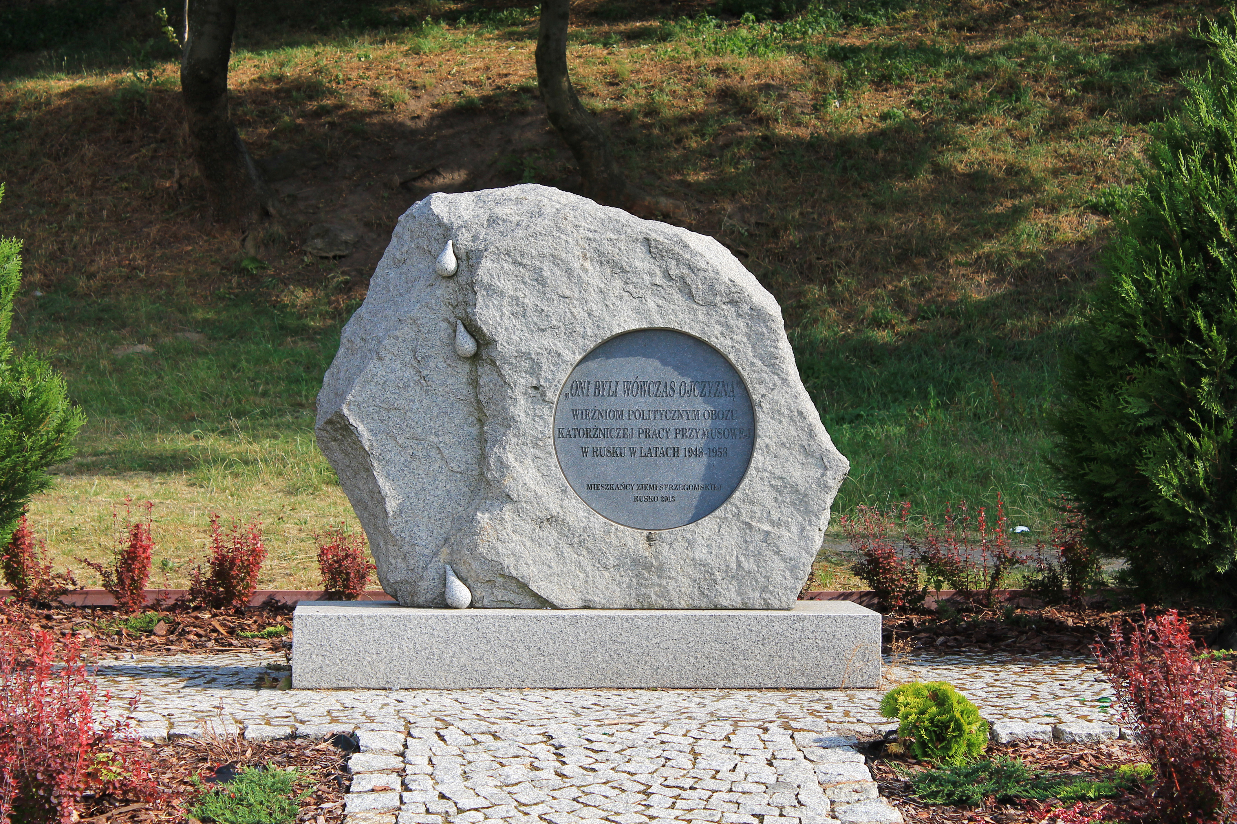 Rusko, gmina Strzegom, województwo dolnośląskie. Pomnik upamiętniający więźniów politycznych przetrzymywanych w Rusku w obozie pracy przymusowej.